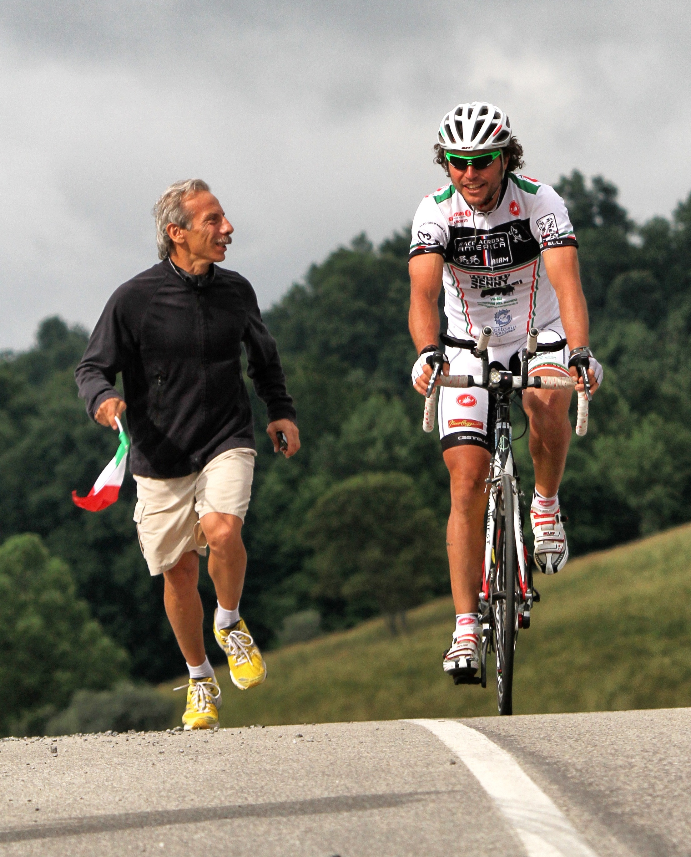 Con Giovanni Storti durante la RAAM 2011